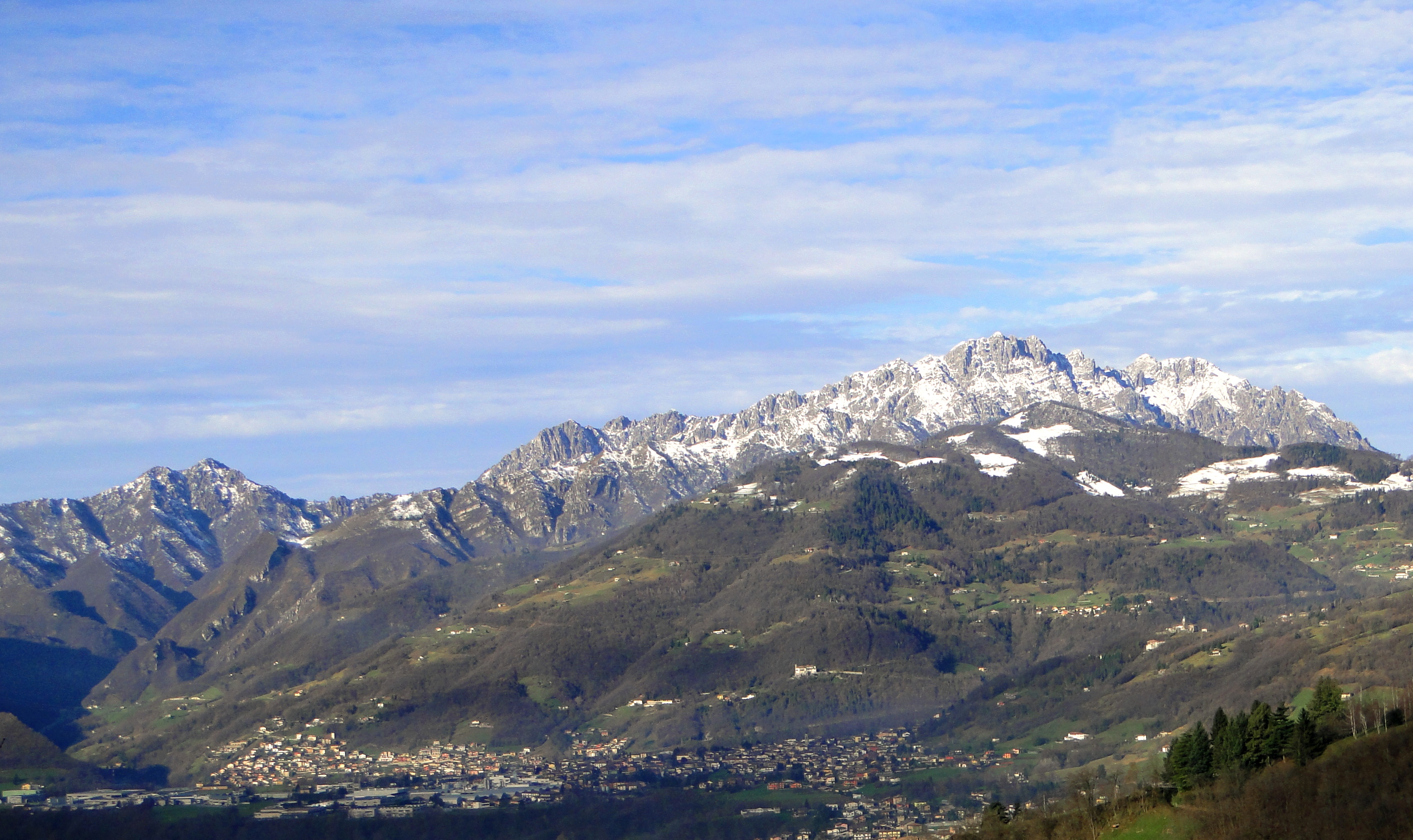 Valle Seriana. Panorama con monti Alben e Cavlera ed i centri di Casnigo e Colzate